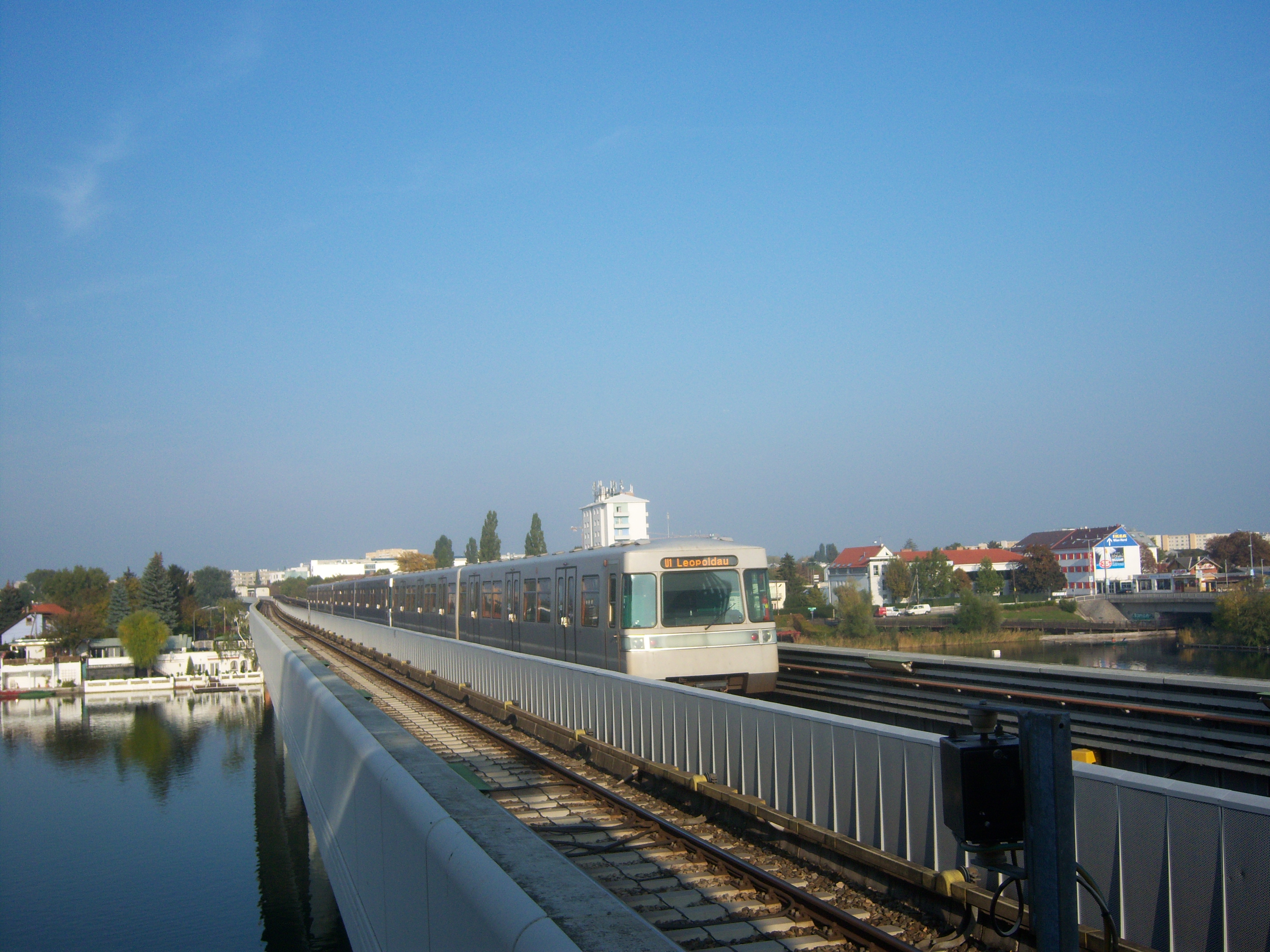 U1-Station Alte Donau